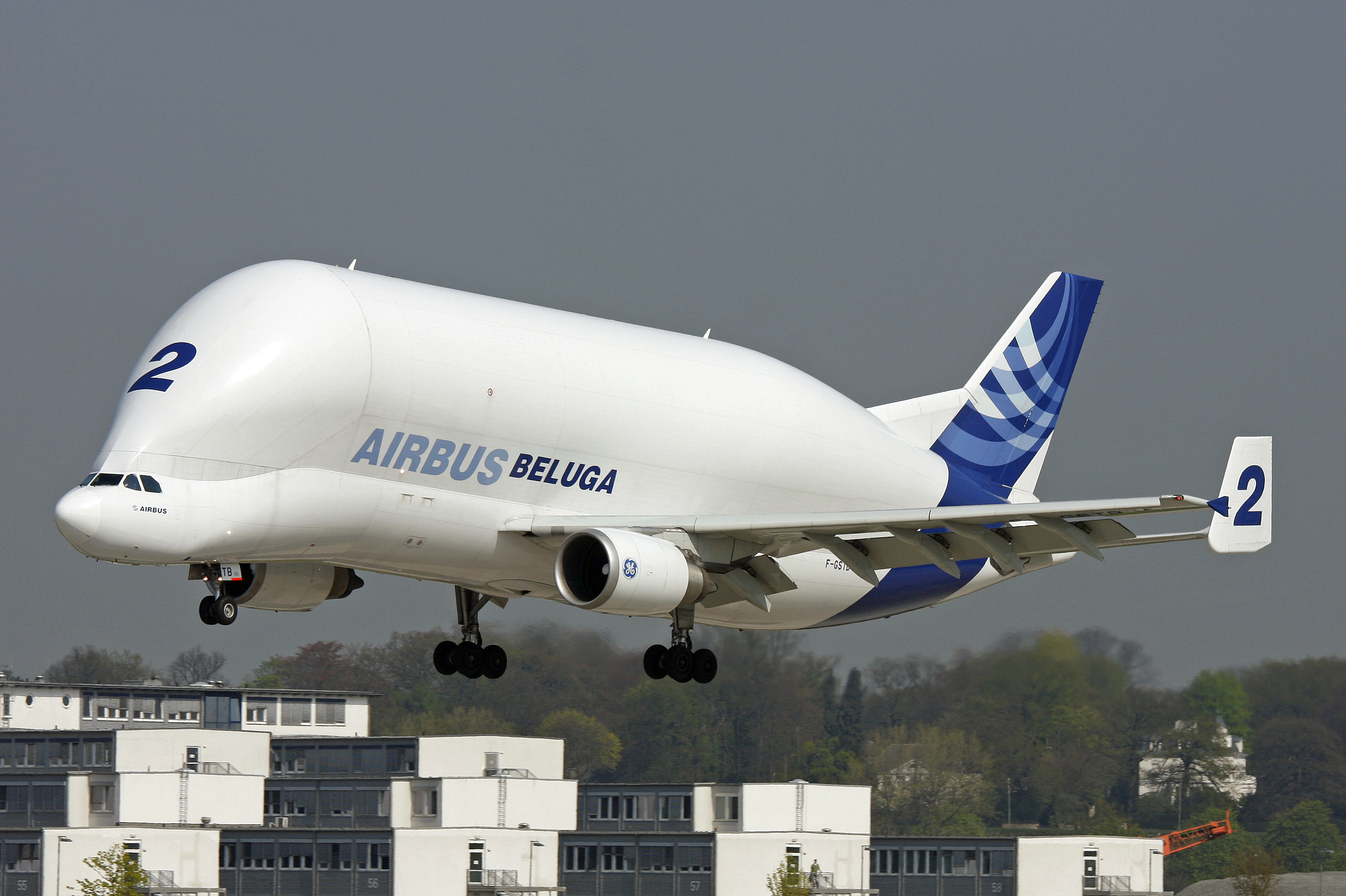 14-04-09 Airbusplant Finkenwerder